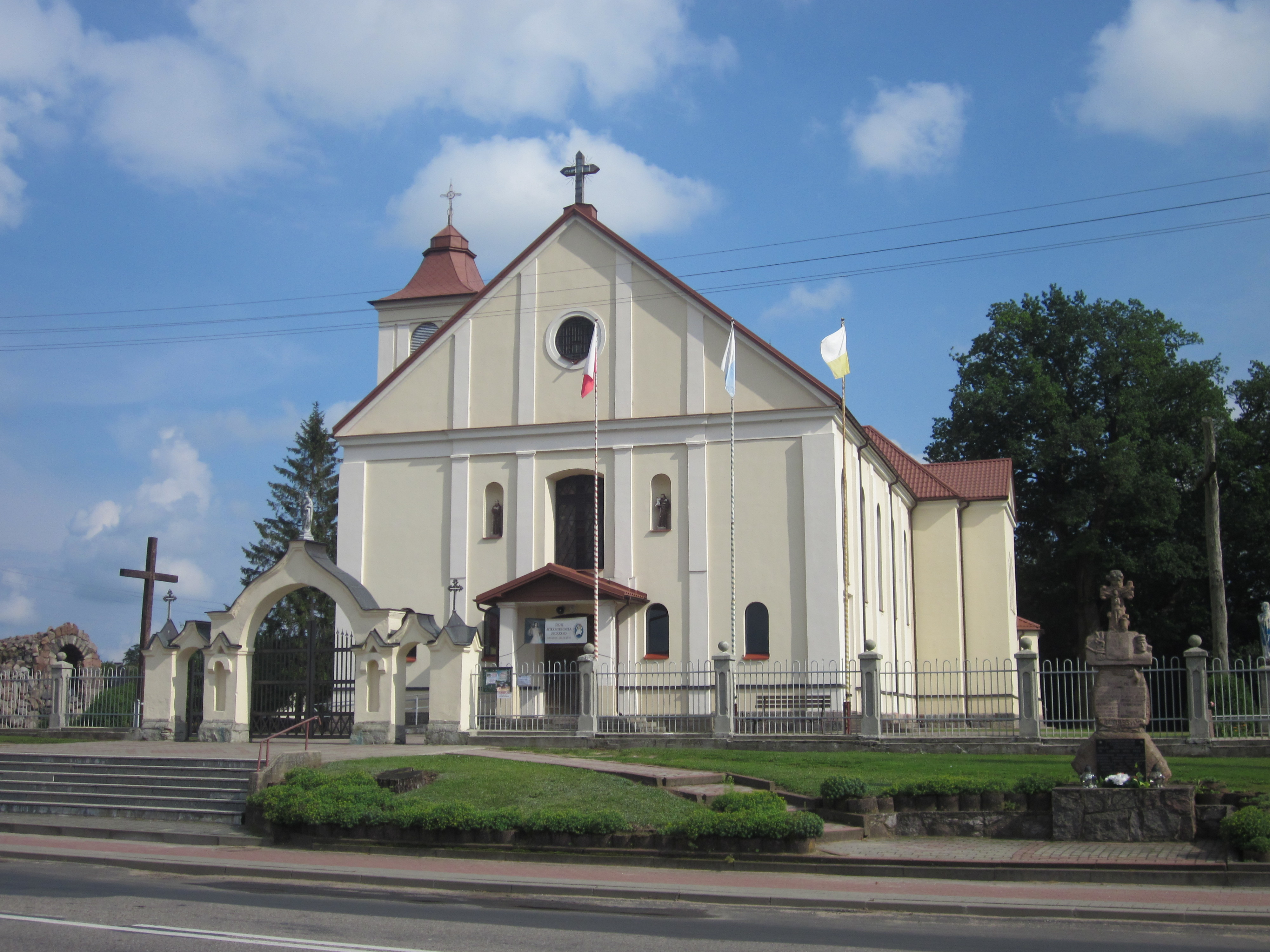 Dekanat Szepietowo